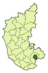 Bangalore Urban dist is also "Bangalore district"